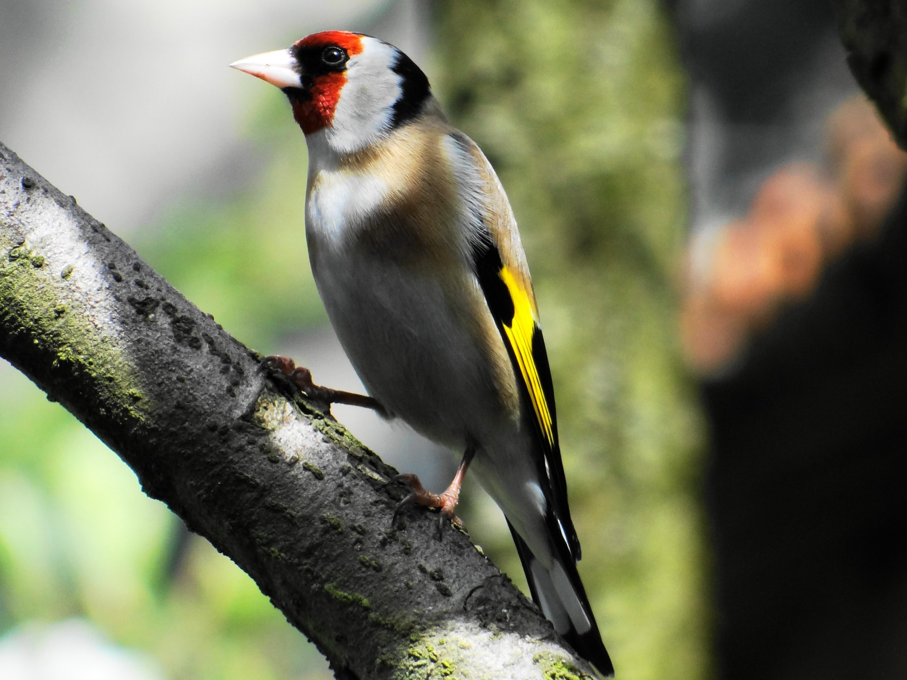 chardonneret élégant